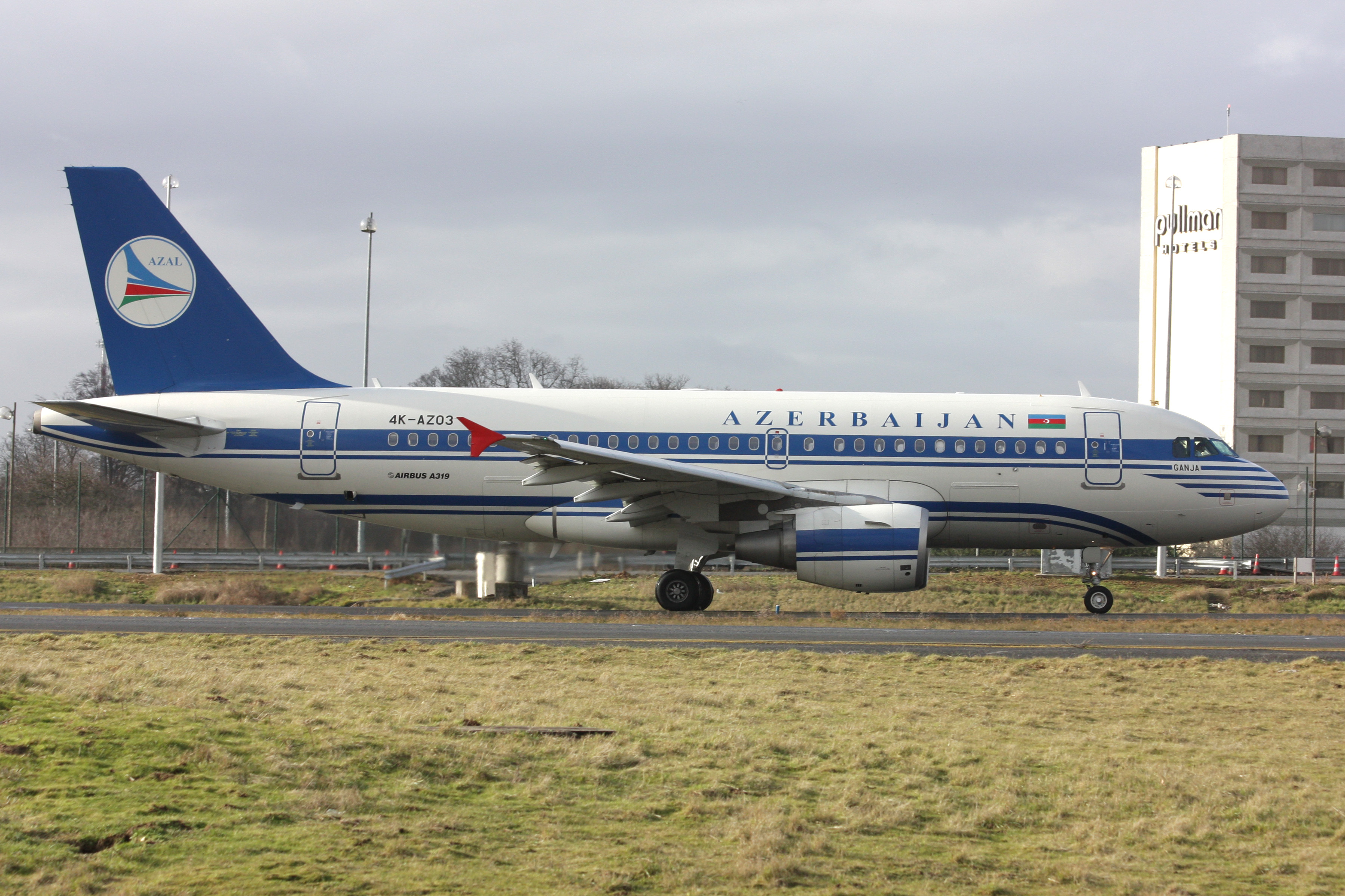 A319-100 de la compagnie Azerbaijan Airlines au roulage à Paris-Charles-de-Gaulle.